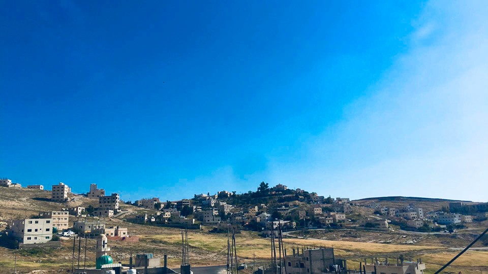 صورة تبين طريقة توزيع المباني على جبال منطقة ماركا الشمالية في العاصمة عمان